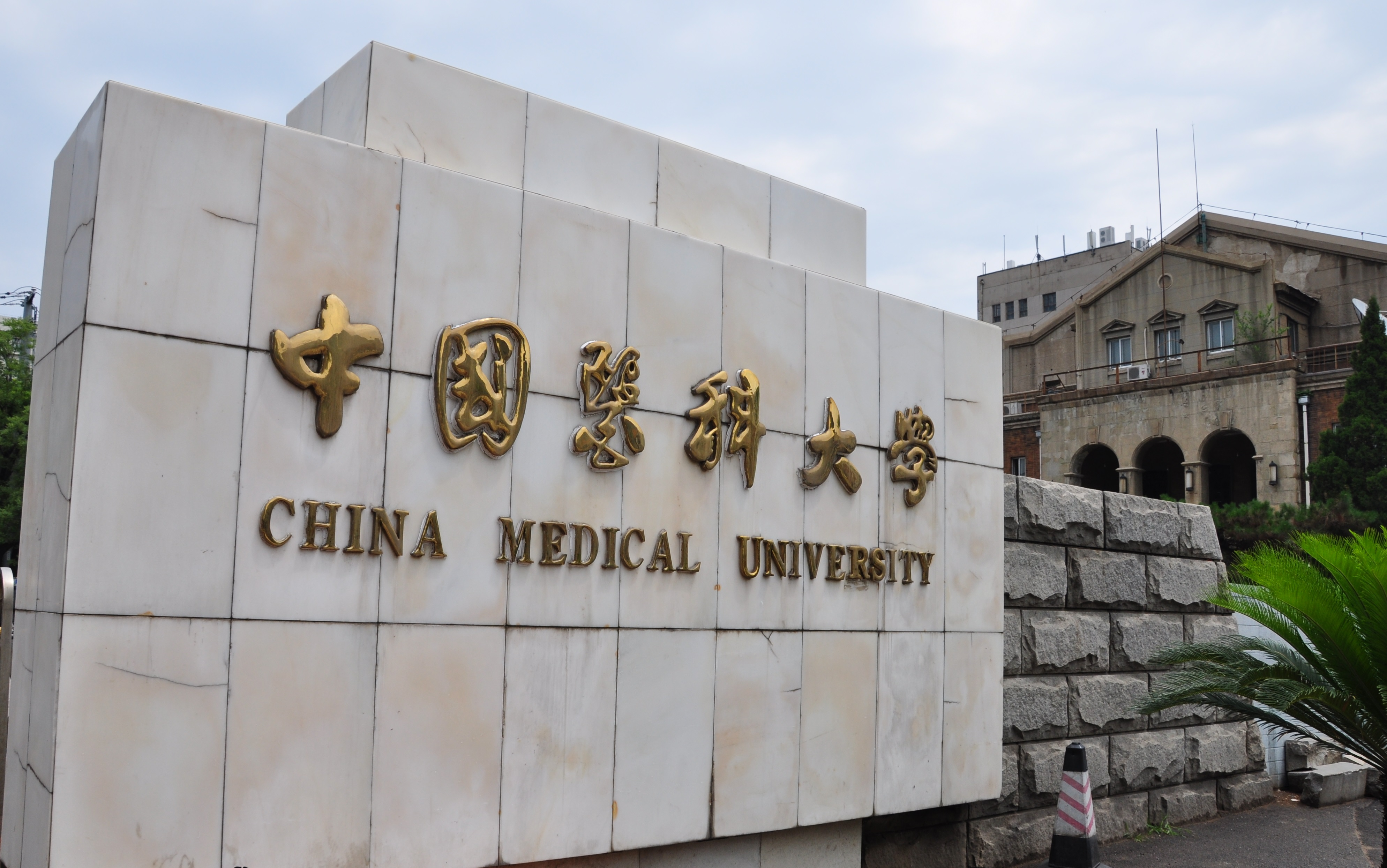 中文（中国大陆）: 郭沫若题写中国医科大学校名